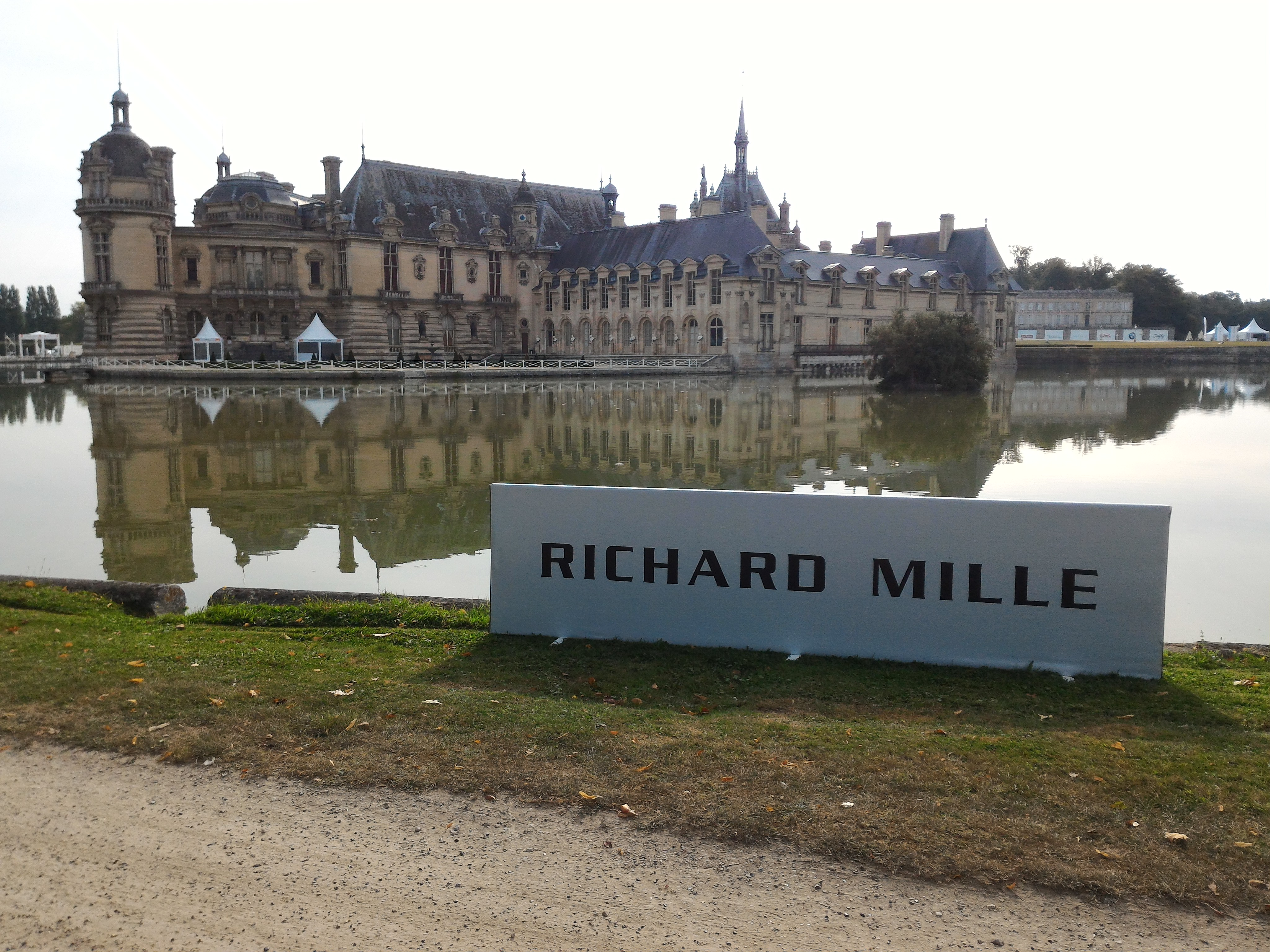 Château de Chantilly pendant le concours d'élégance Richard Mille